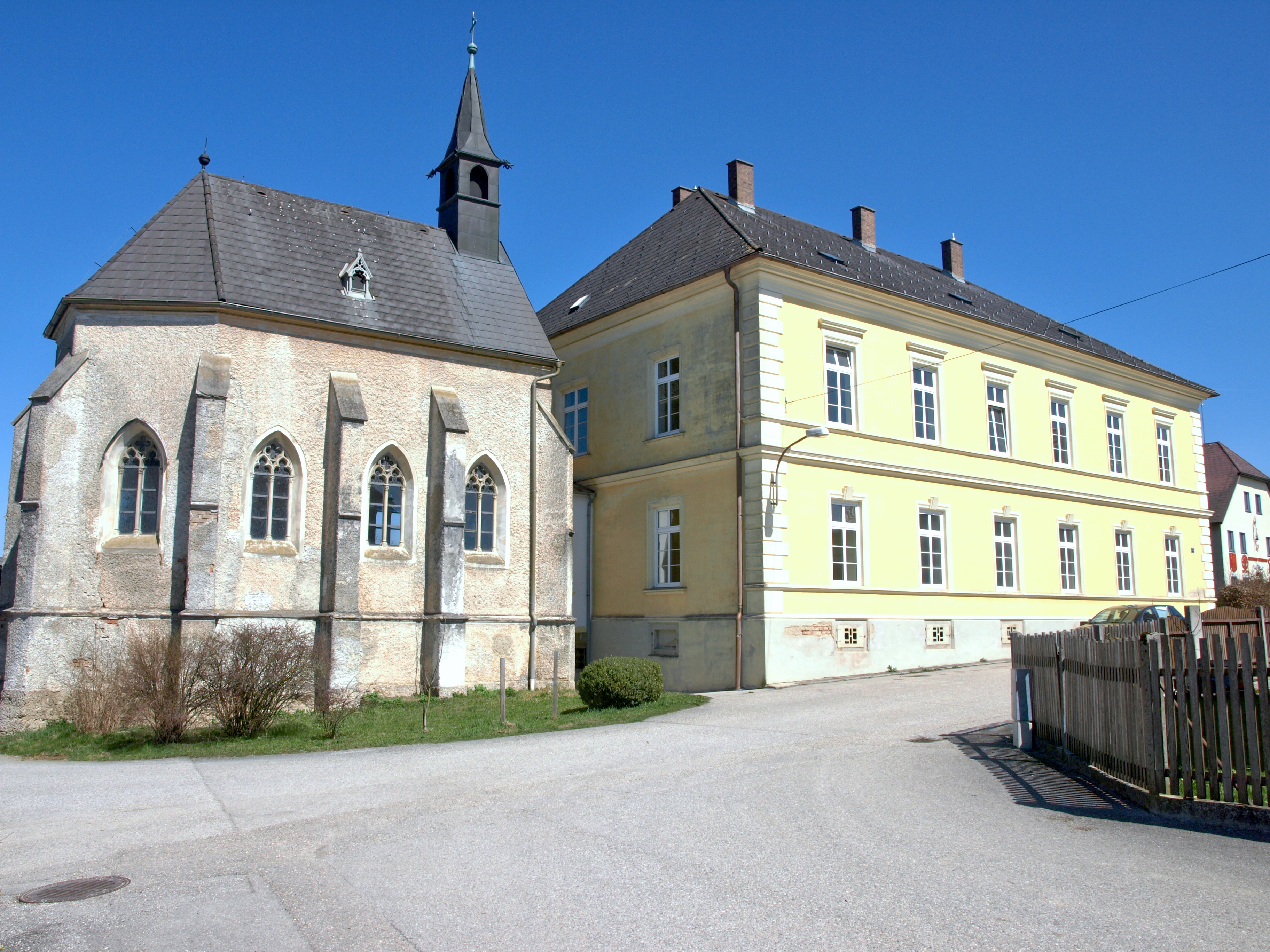 Ehem. Versorgungsheim mit Versorgungsheimkapelle